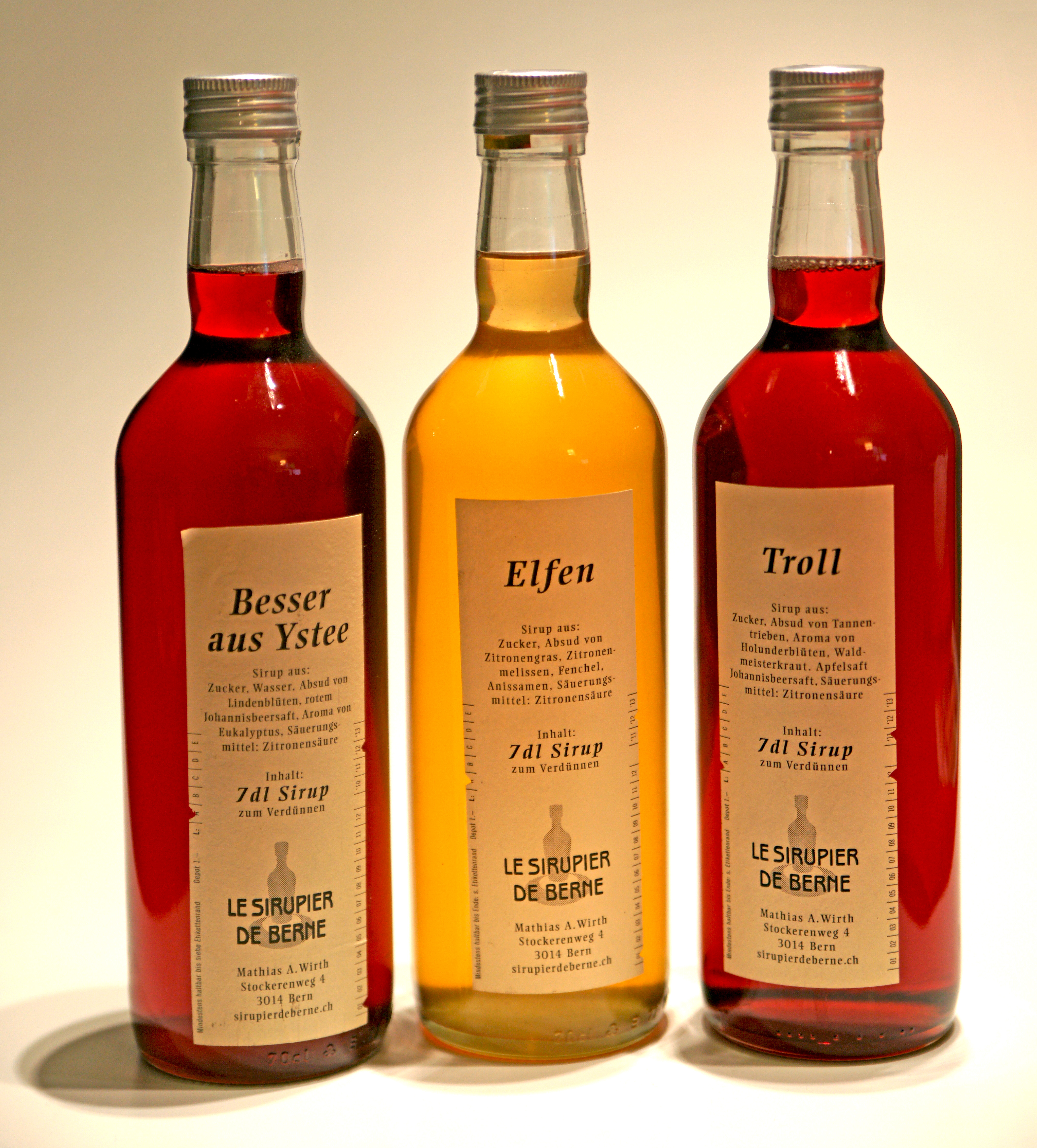 Sirup vom Sirupier de Berne.